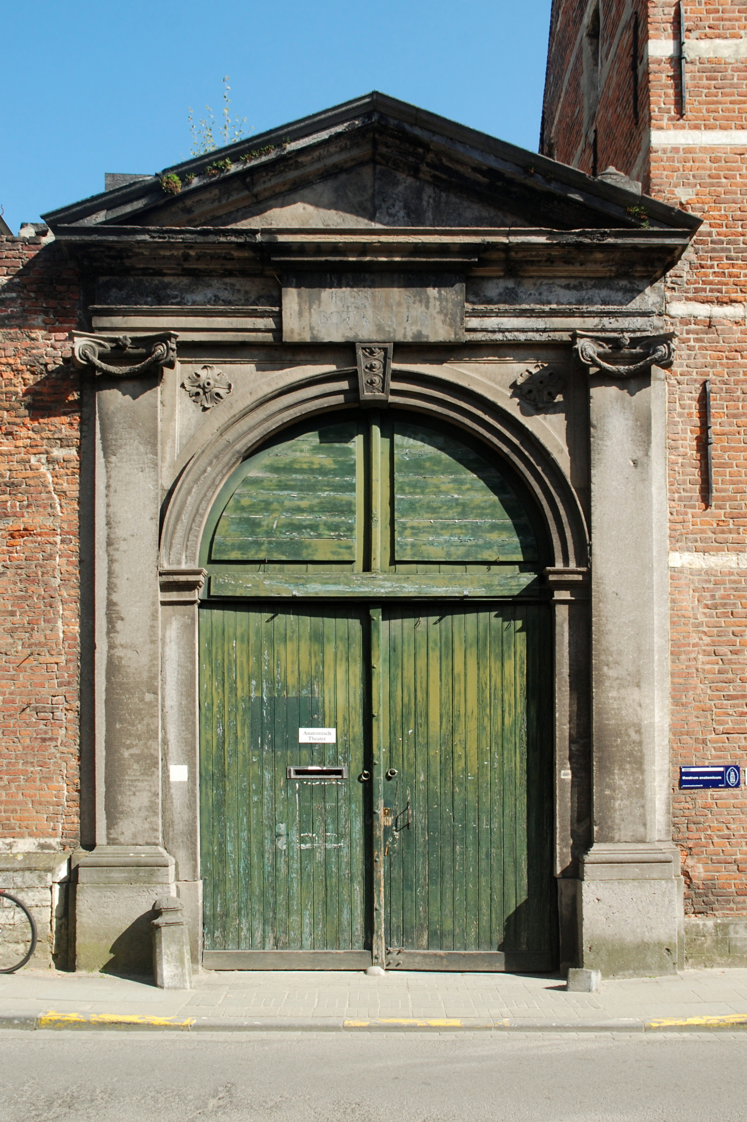 Belgique - Louvain - Jardin botanique (Kruidtuin) - portail néo-classique de l'ancien jardin botanique (architecte Laurent-Benoît Dewez -1771)